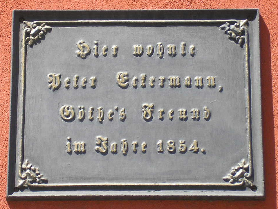 Gedenktafel zu Ehren von Peter Eckermann an einem Haus in der Marktstraße in Ilmenau (Thüringen).